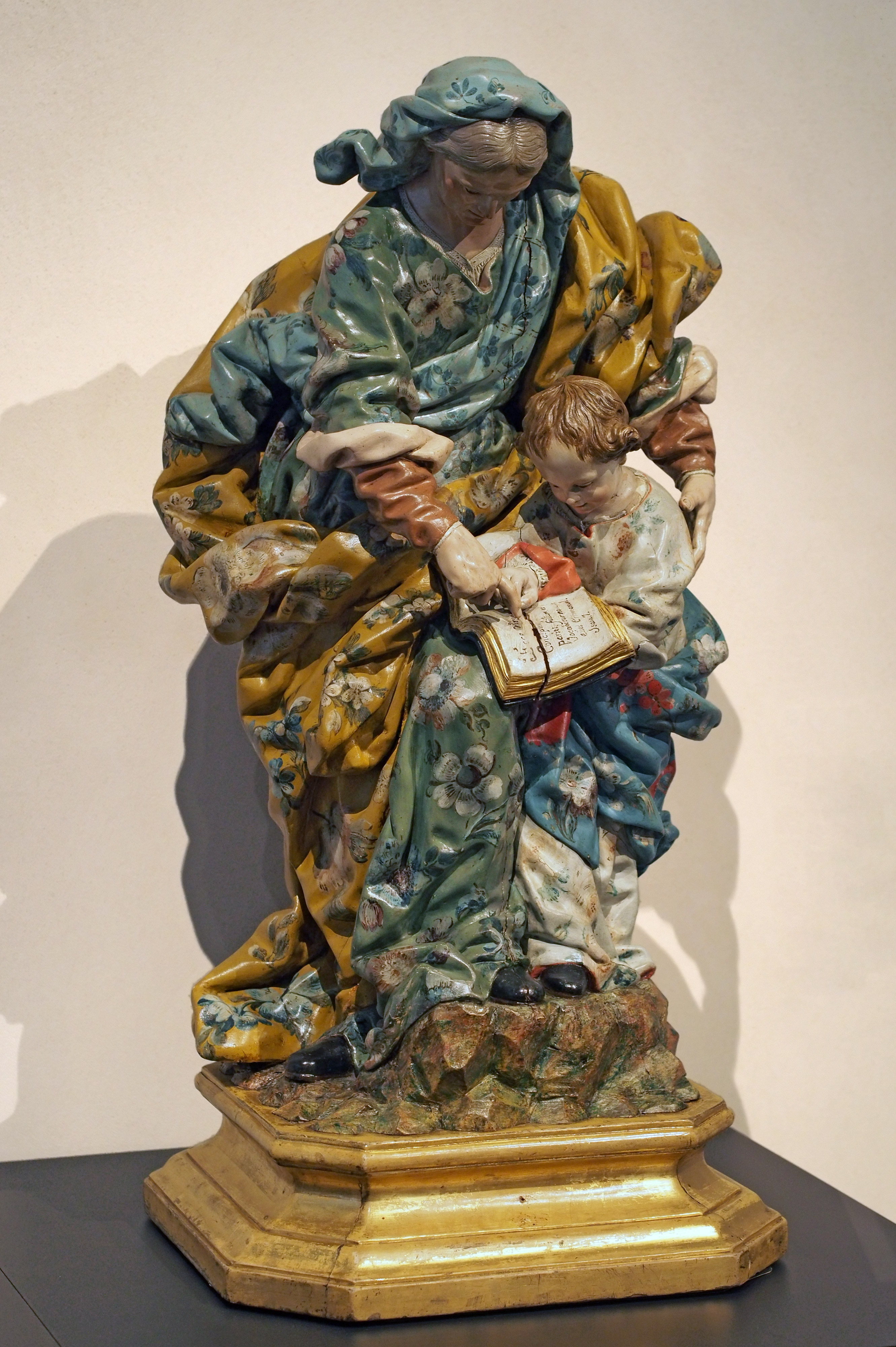 Santa Ana enseñando las Escrituras a la Virgen, madera policromada, segunda mitad del s. XVIII. El dedo señala la «profecía» de Isaías: Ecce Virgo concipiet, pariet, filium, vocabitur nomen eius Emmanuel. Autor: Juan Porcel.